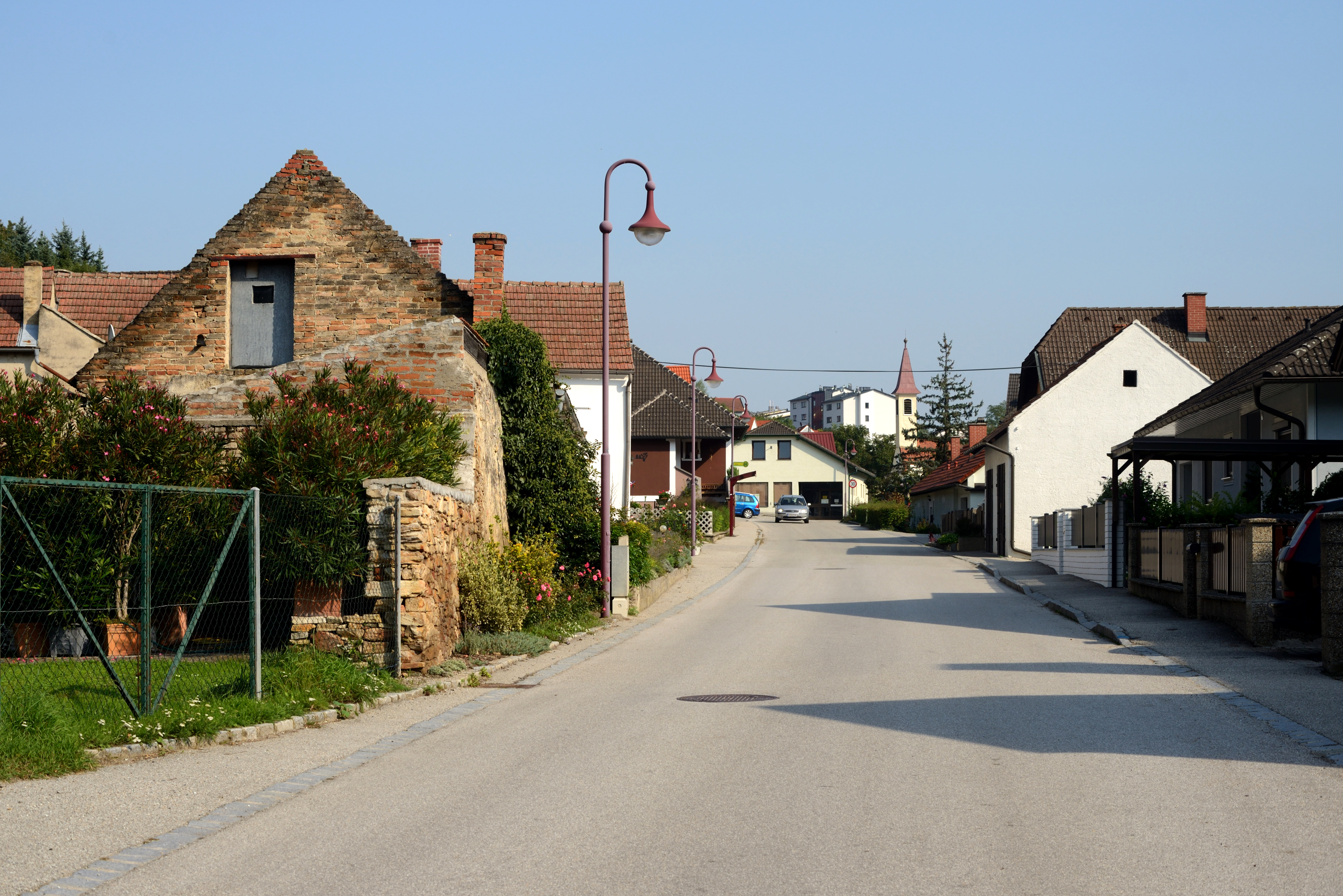 Hauptstraße in Paudorf